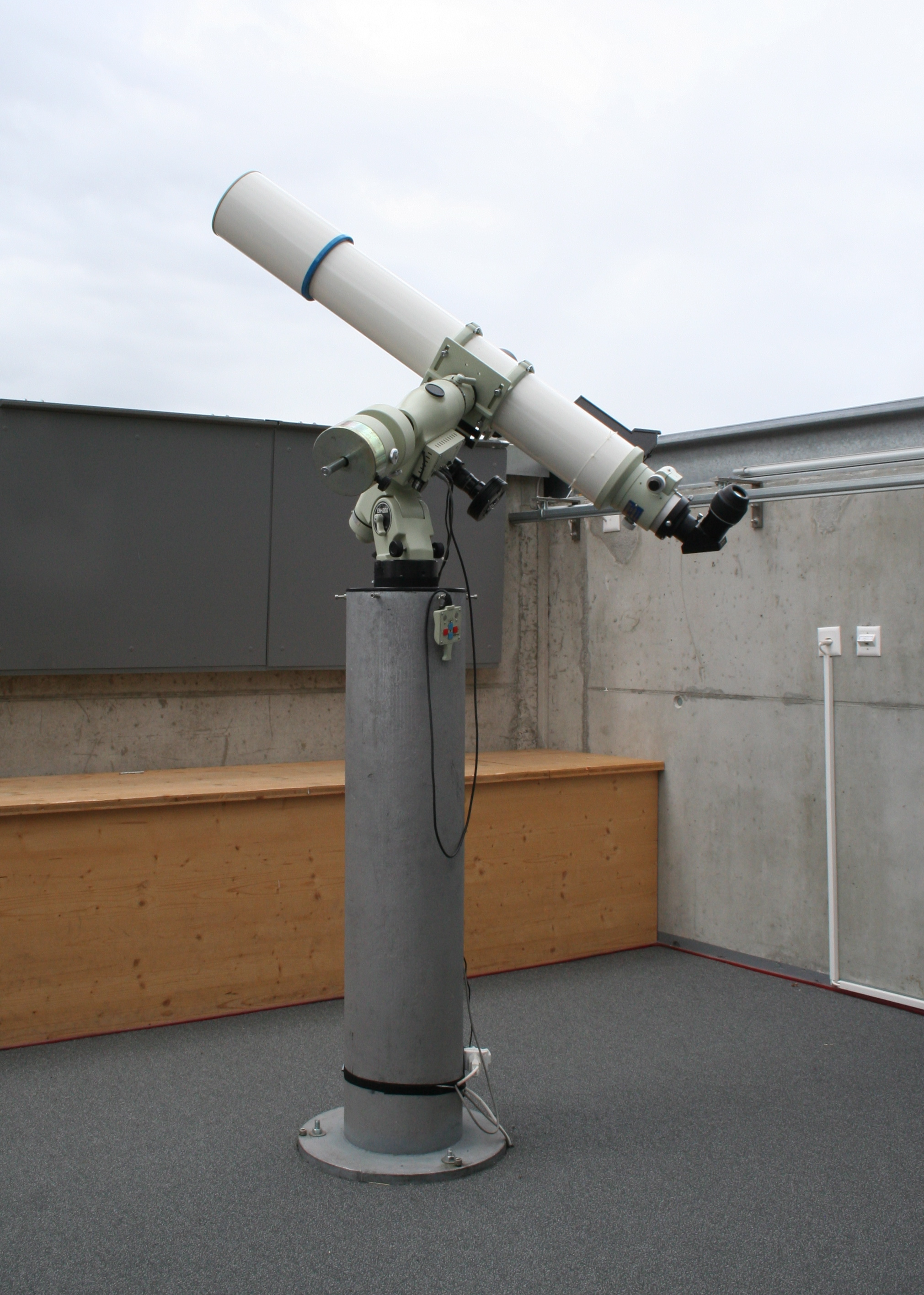 Sternwarte Mirasteilas Takahashi Teleskop